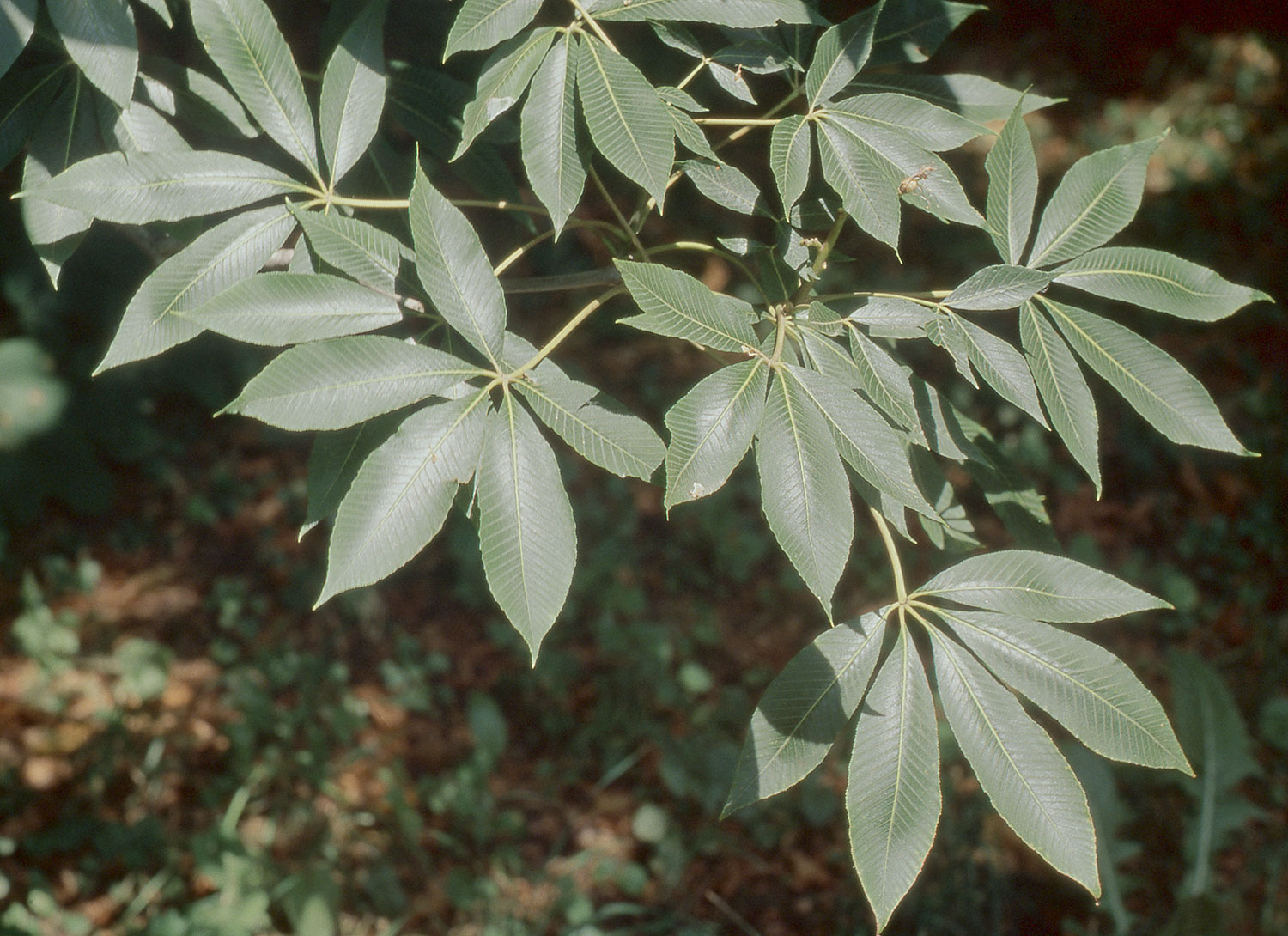 Aesculus sp., Киевский ботсад